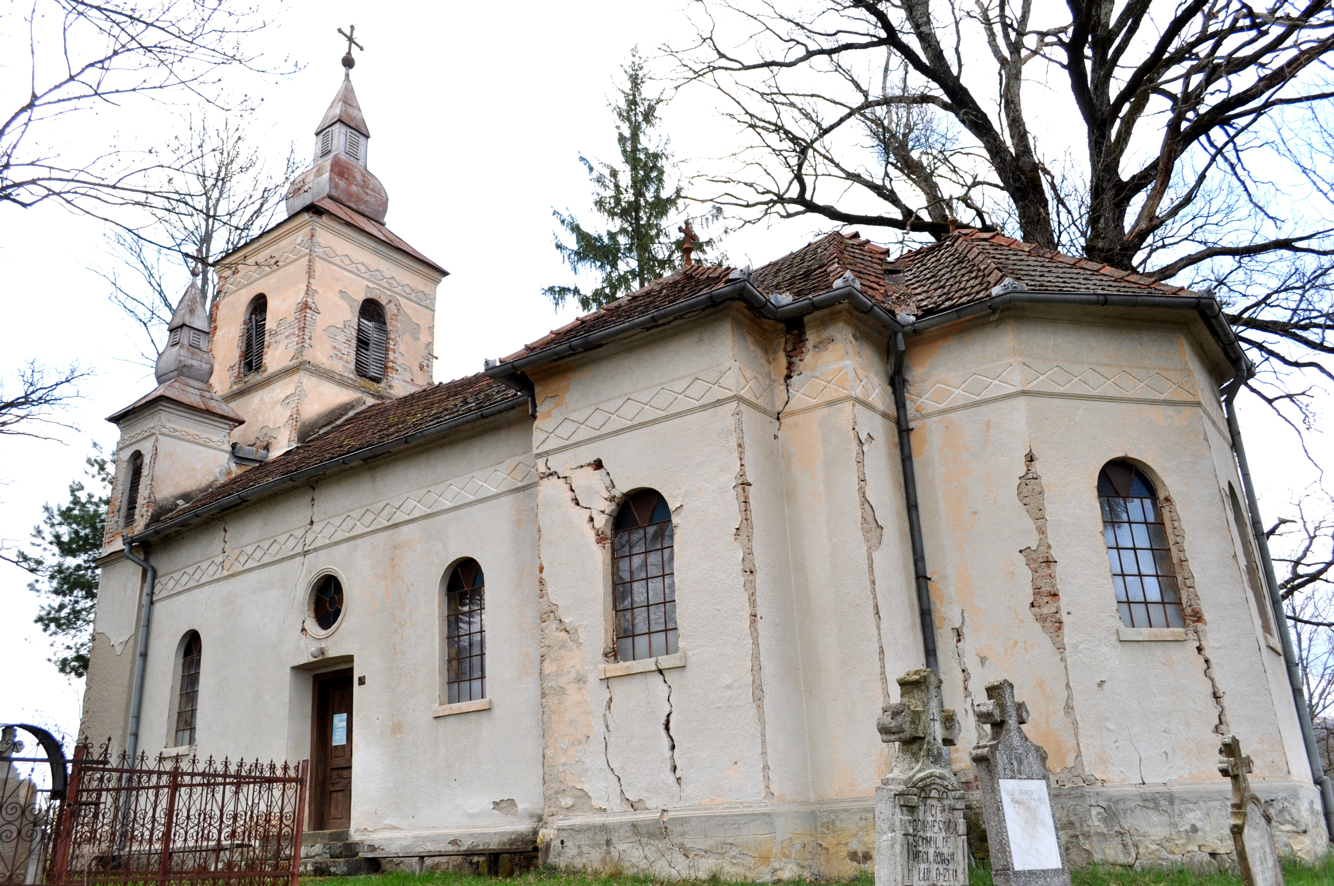 Biserica "Sfinții Arhangheli" , sat LEAUŢ; comuna TOMEŞTI, județul Hunedoara